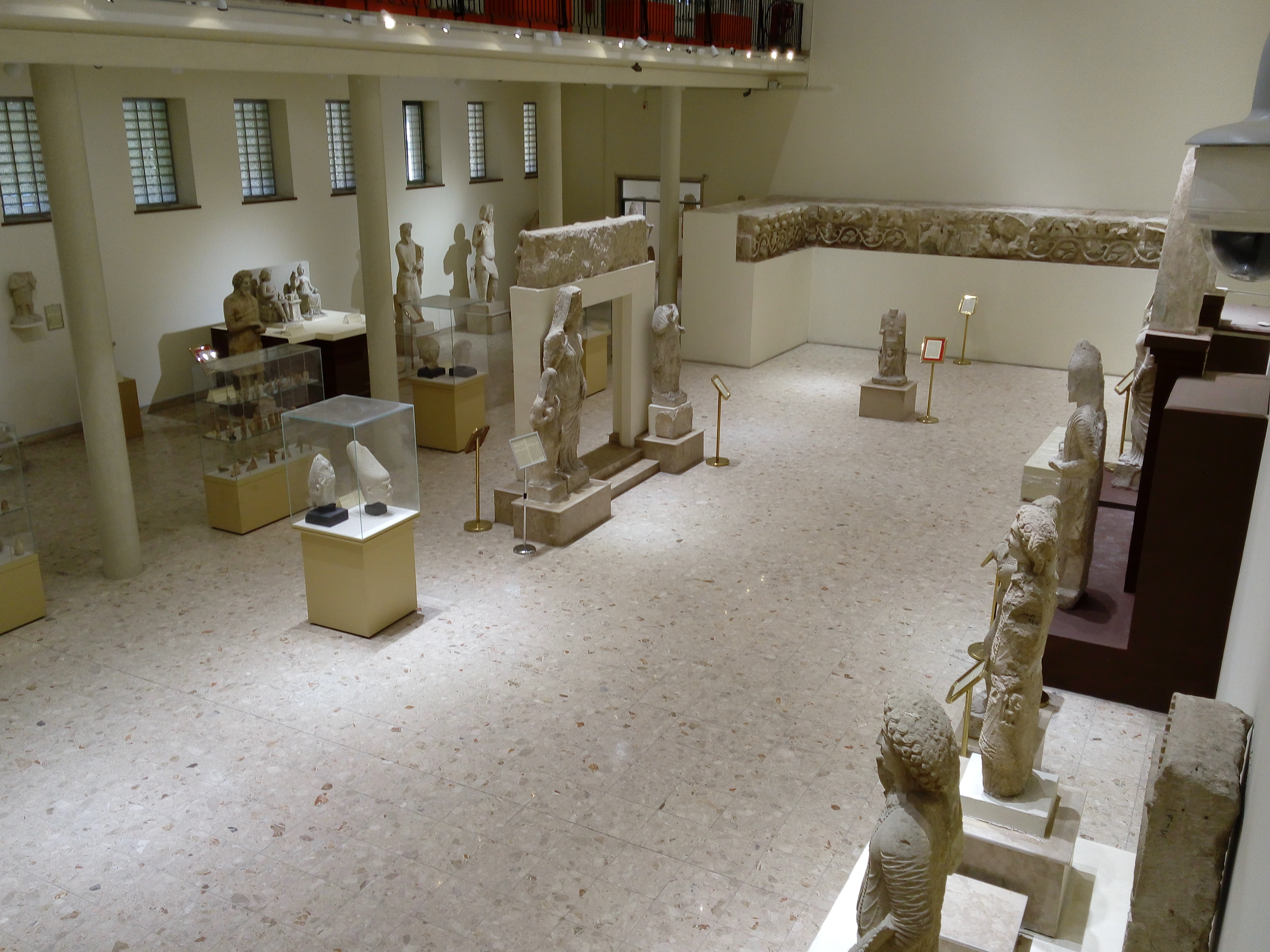 القاعة الآشورية، المتحف العراقي 2016